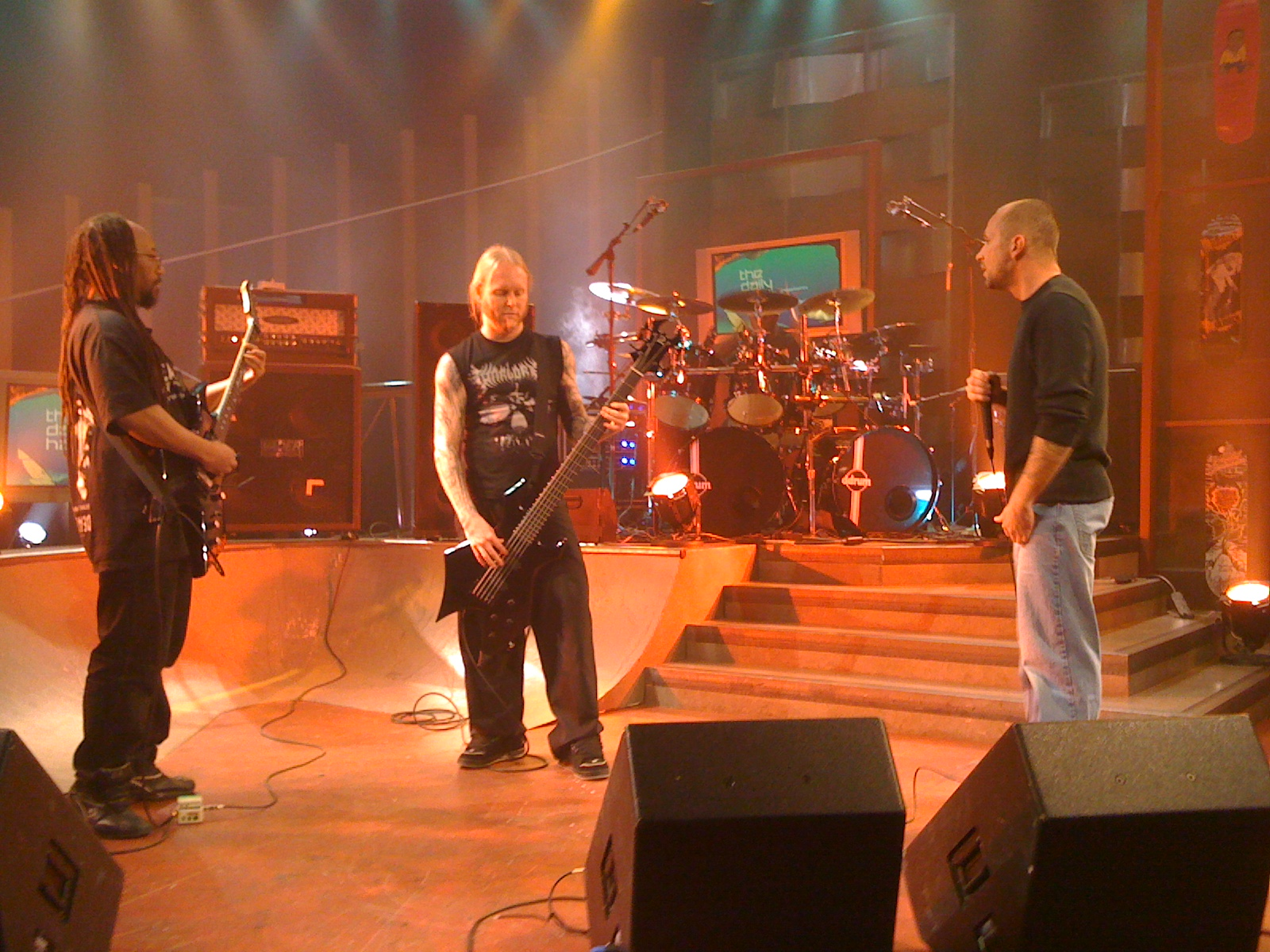 From left: Terrance Hobbs, Derek Boyer, Frank Mullen